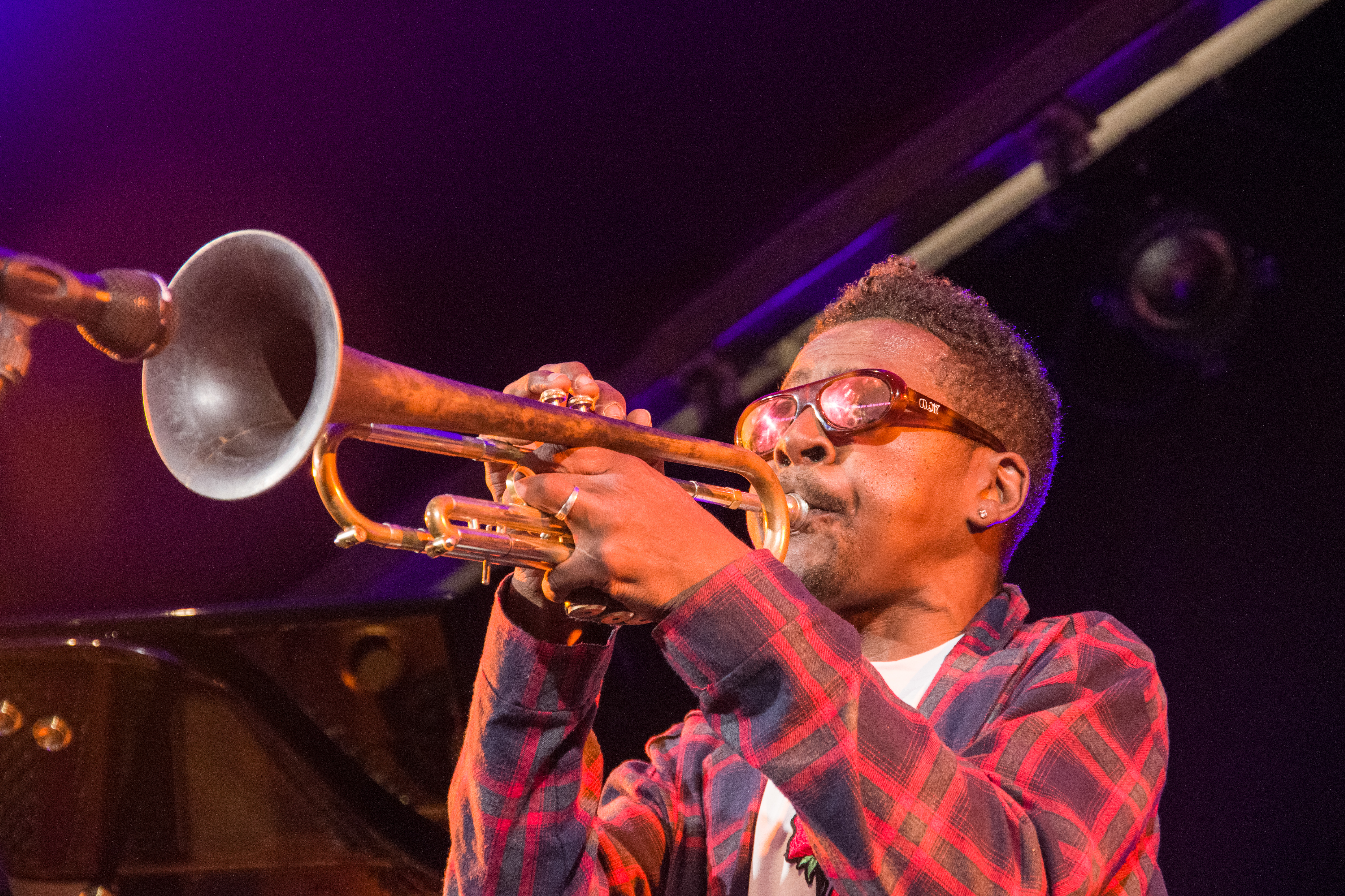 Das Zelt-Musik-Festival 2018 in Freiburg im Breisgau 20.07.2018 Roy Hargrove Quintet